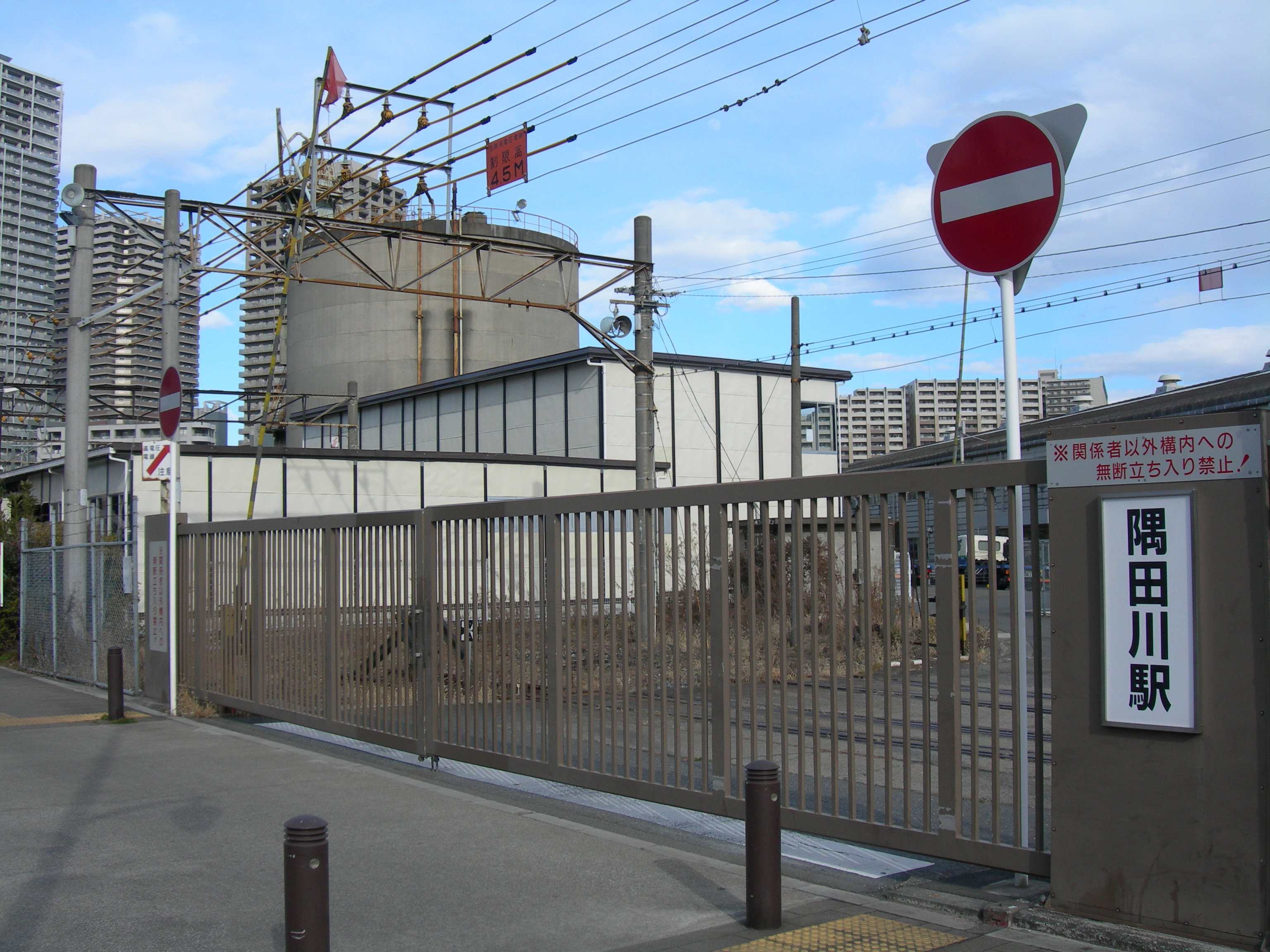 隅田川駅